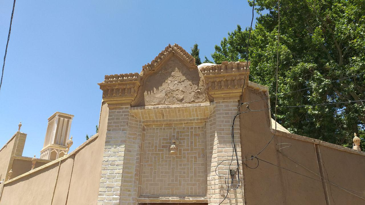 ورودی اصلی باغ که در گذشه عبور و مرور از این ورودی انجام می شده است.